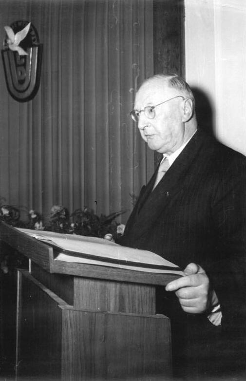 Zentralbild Gielow Me-Ho. 23.2.1953 Festsitzung des Hauptvorstandes der CDU zu Ehren des 70. Geburtstages von Otto Nuschke am 22.2.53 in Berlin UBz: Dr. Reinhold Lobedanz, Präsident der Länderkammer, spricht.